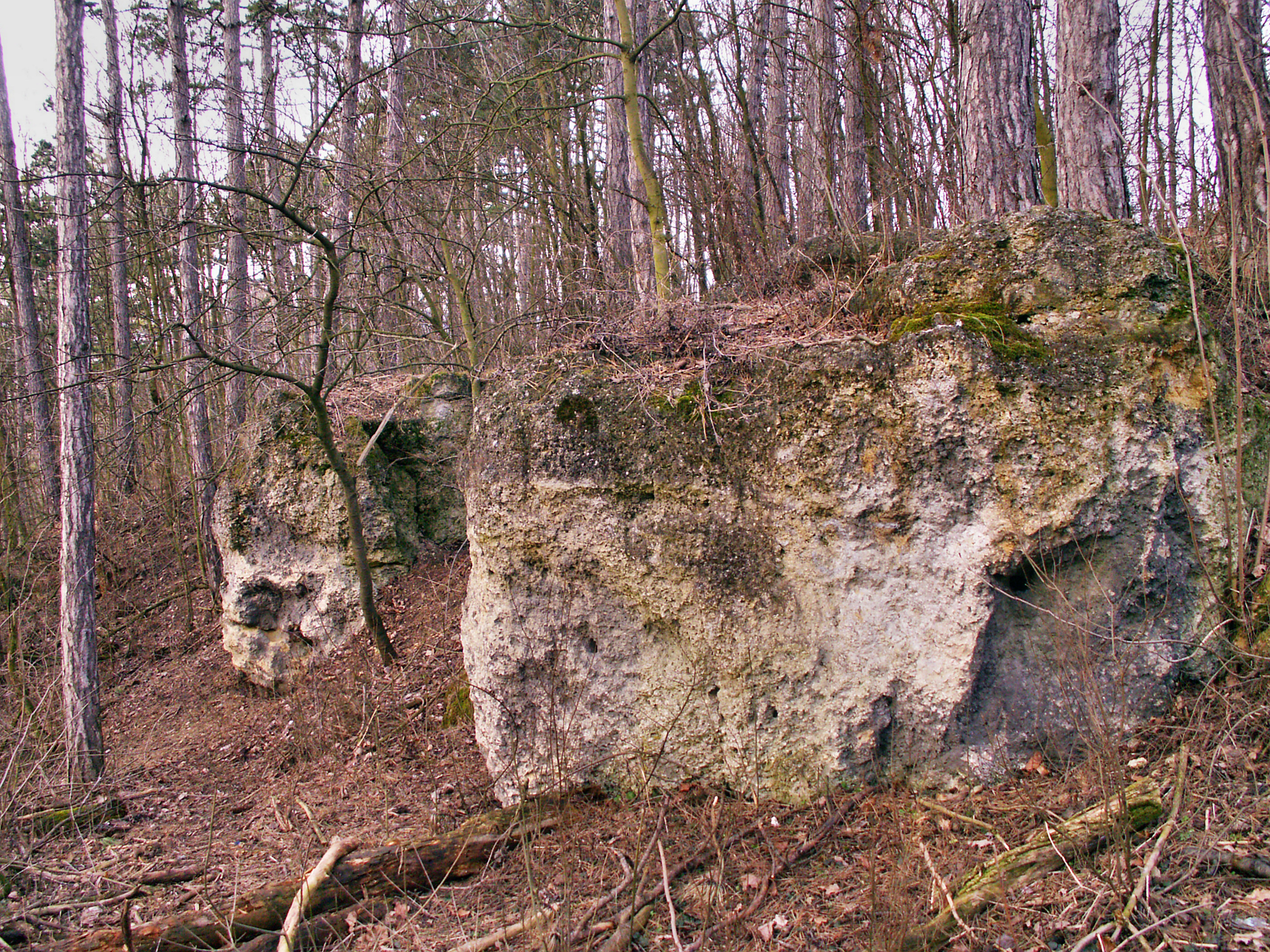 Přírodní památka Hřebenatkový útes, vápencový útvar, stáří miocén, okres Vyškov